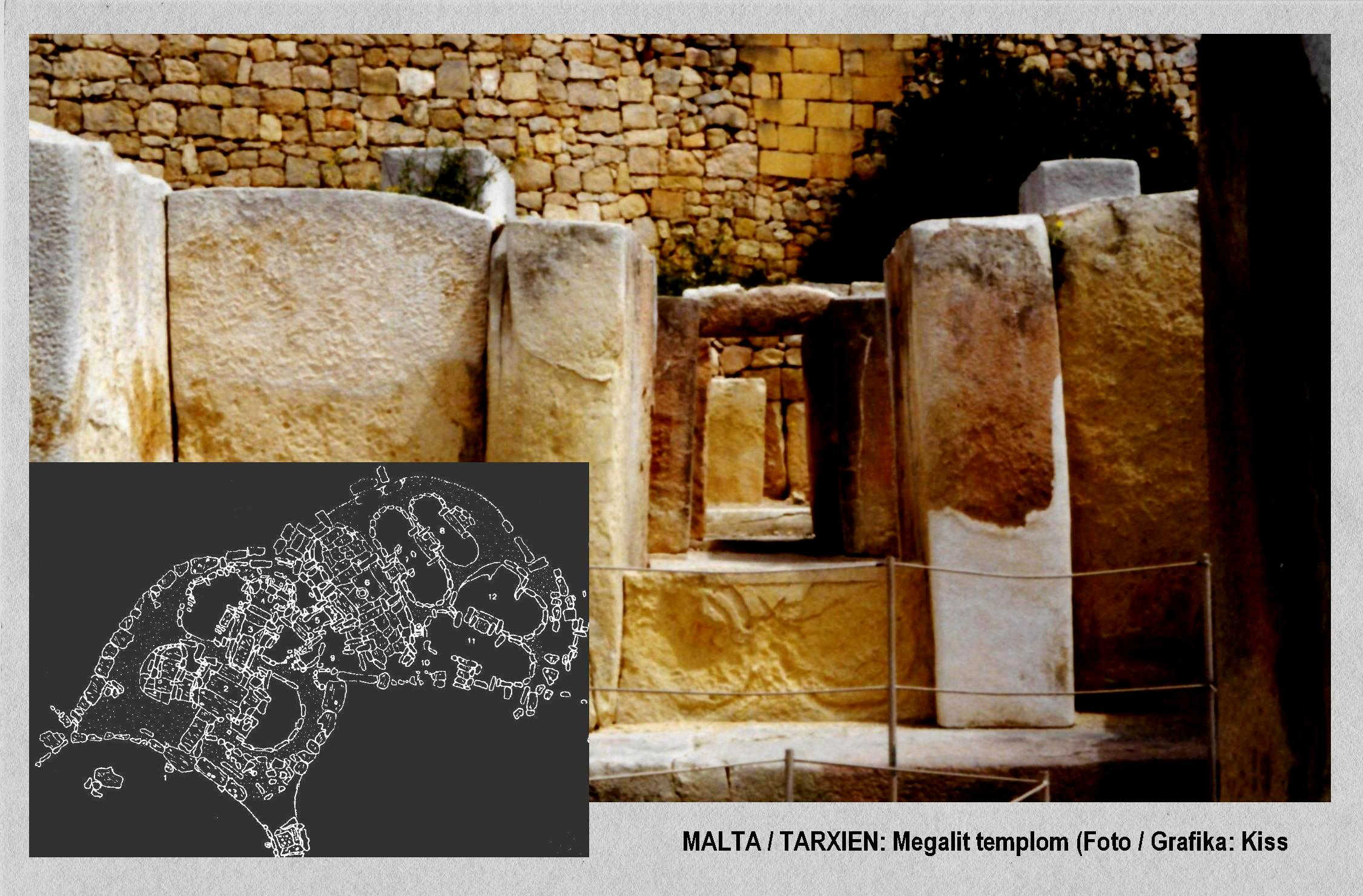 Tarxien: Megalit templom, belső tér (Málta)